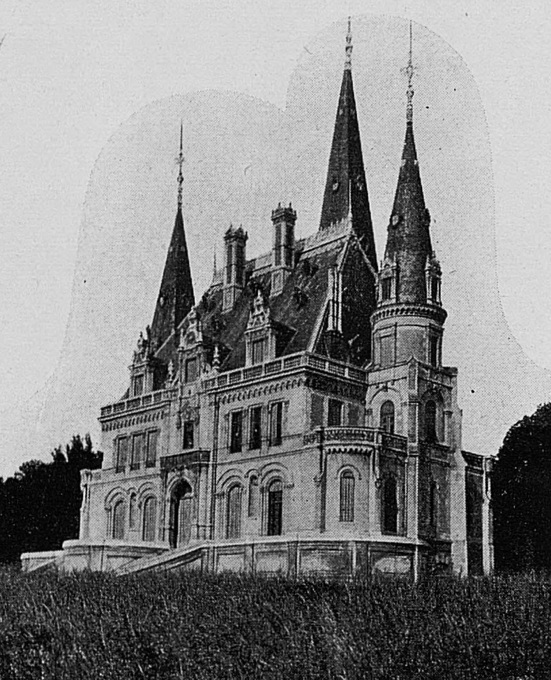 Dictionnaire illustré des communes du département du Rhône. Tome 1 / par MM. E. de Rolland et D. Clouzet.